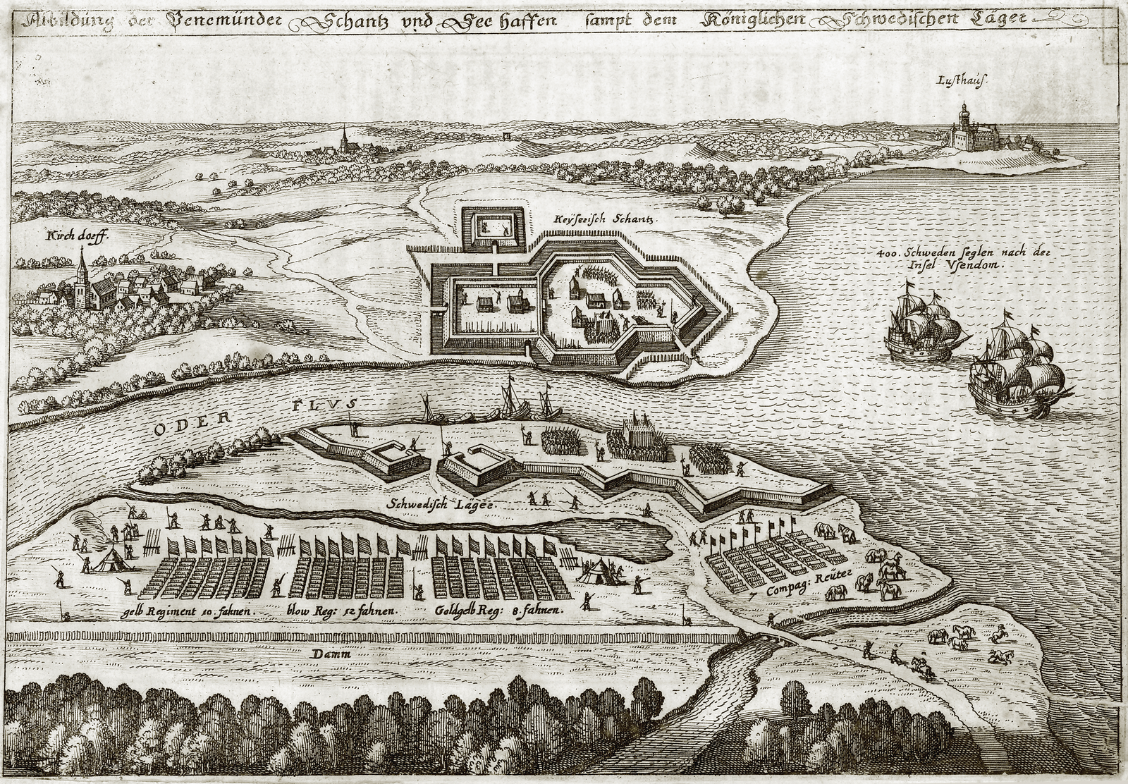 Peenemünde nach Landung der Schweden 1630